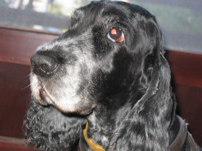 Wolfika, a cocker spániel Budapesten